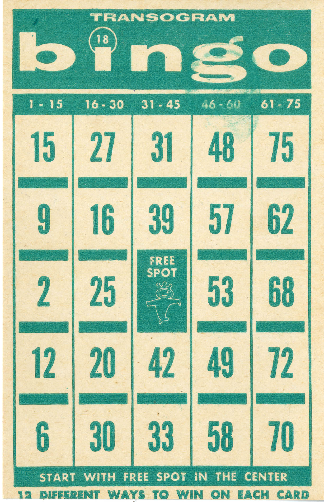 Bingo card.